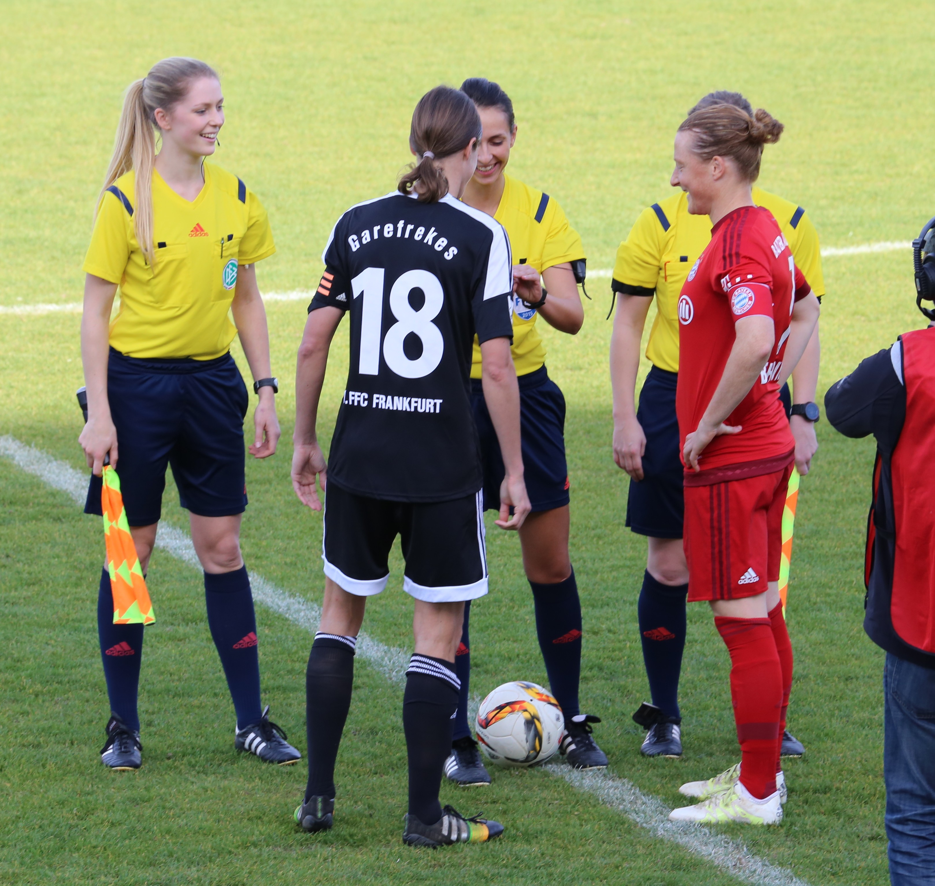 Melanie Behringer (FC Bayern München), Kerstin Garefrekes (1. FFC Frankfurt) bei der Seitenwahl im DFB-Pokal-Achtelfinale zwischen FC Bayern München und 1. FFC Frankfurt, Ergebnis 2:0, Stadion an der Grünwalder Straße